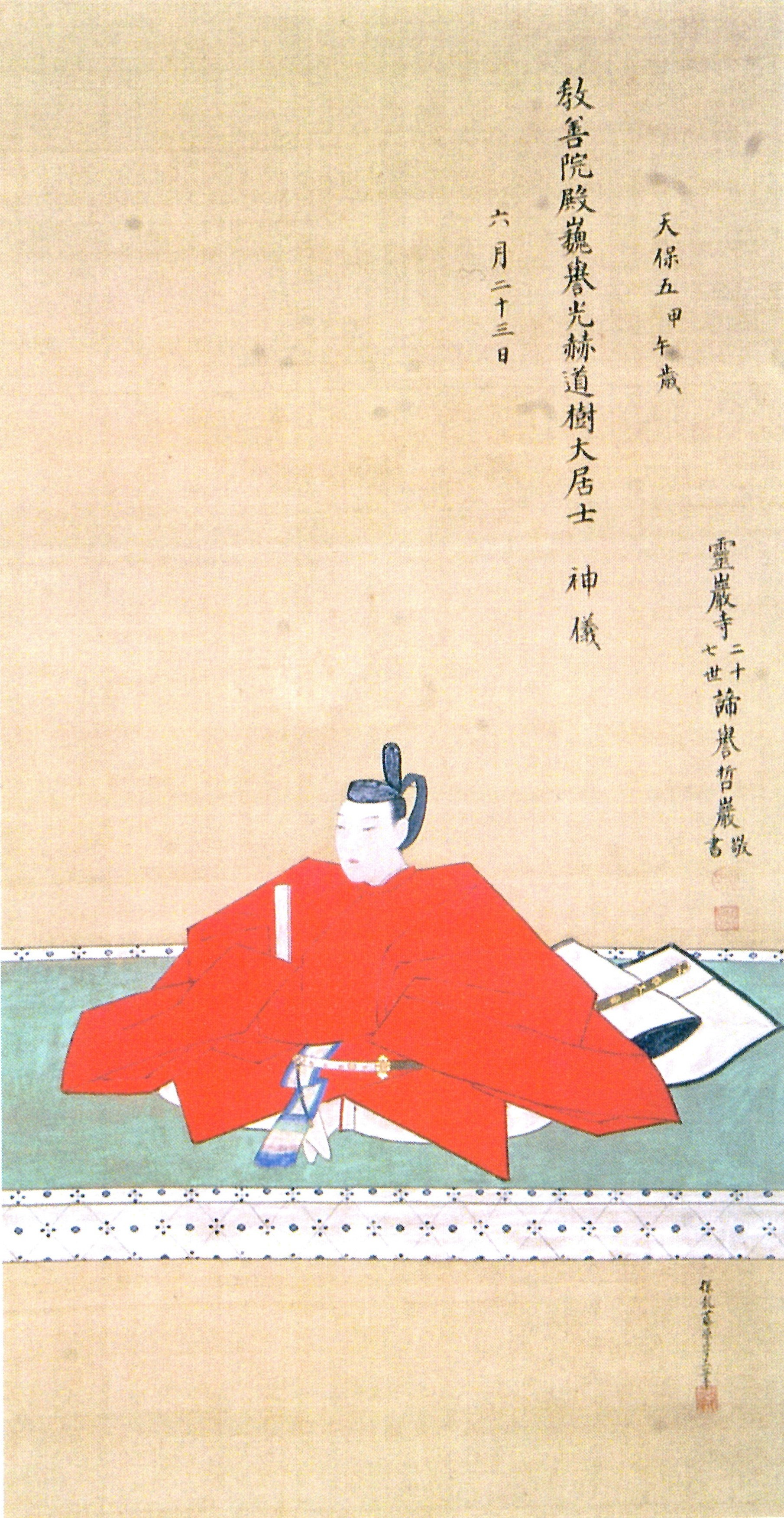 京極高鎮の肖像。